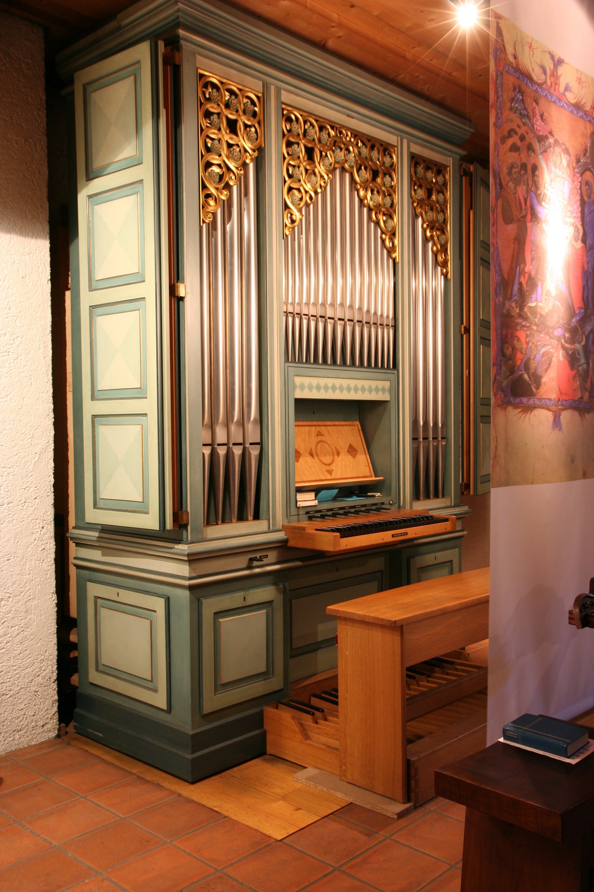 Römisch-katholische Pfarrkirche St. Georg Küsnacht ZH